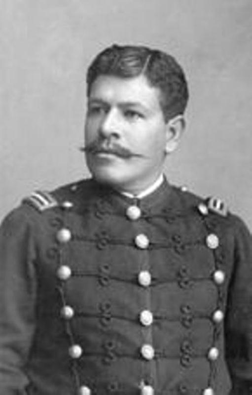 Fotografía del Gral. Flavio Evaristo Alfaro Santana, revolucionario liberal ecuatoriano. Nacido en Montecristi, el 22 de junio de 1865. Fallecido en Quito, el 28 de enero de 1912. Sobrino del Gral. Eloy Alfaro Delgado, ex presidente del Ecuador y líder de la Revolución Liberal a inicios del siglo XX.